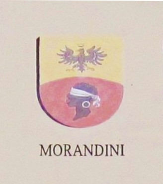 Cognomi storici dei Vicini che discendono dalle famiglie della Regola che abitavano a Predazzo e riguardano 19 cognomi: Boninsegna, Bonora, Bosin, Brigadoi, Defrancesco, Degaudenz, Dellagiacoma, Dellantonio, Dellasega, Demartin, Dezulian, Felicetti, Gabrielli, Giacomelli, Guadagnini, Morandini, Nicolao, Piazzi e Zanna.